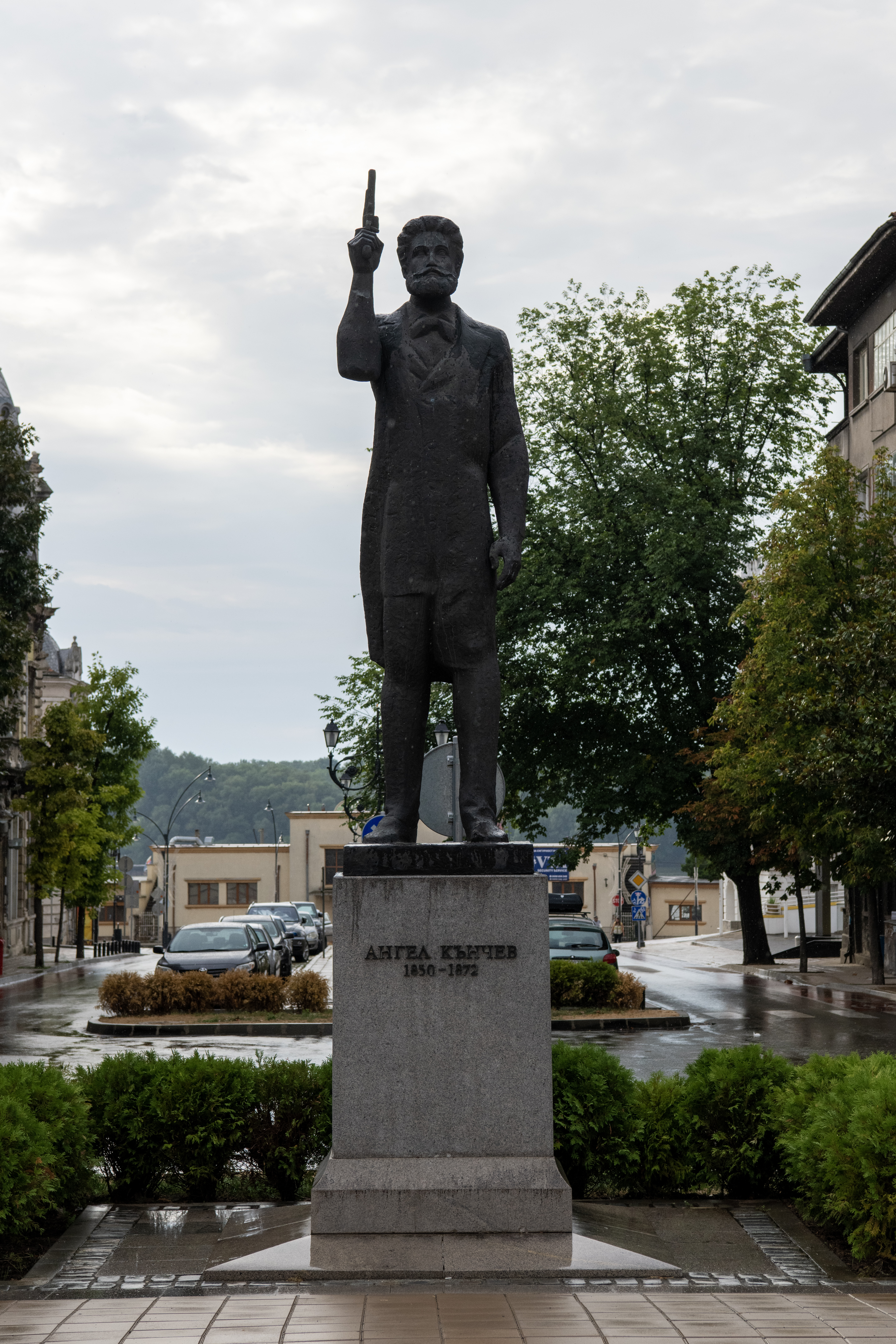 Снимката документира паметника на Ангел Кънчев в град Русе.